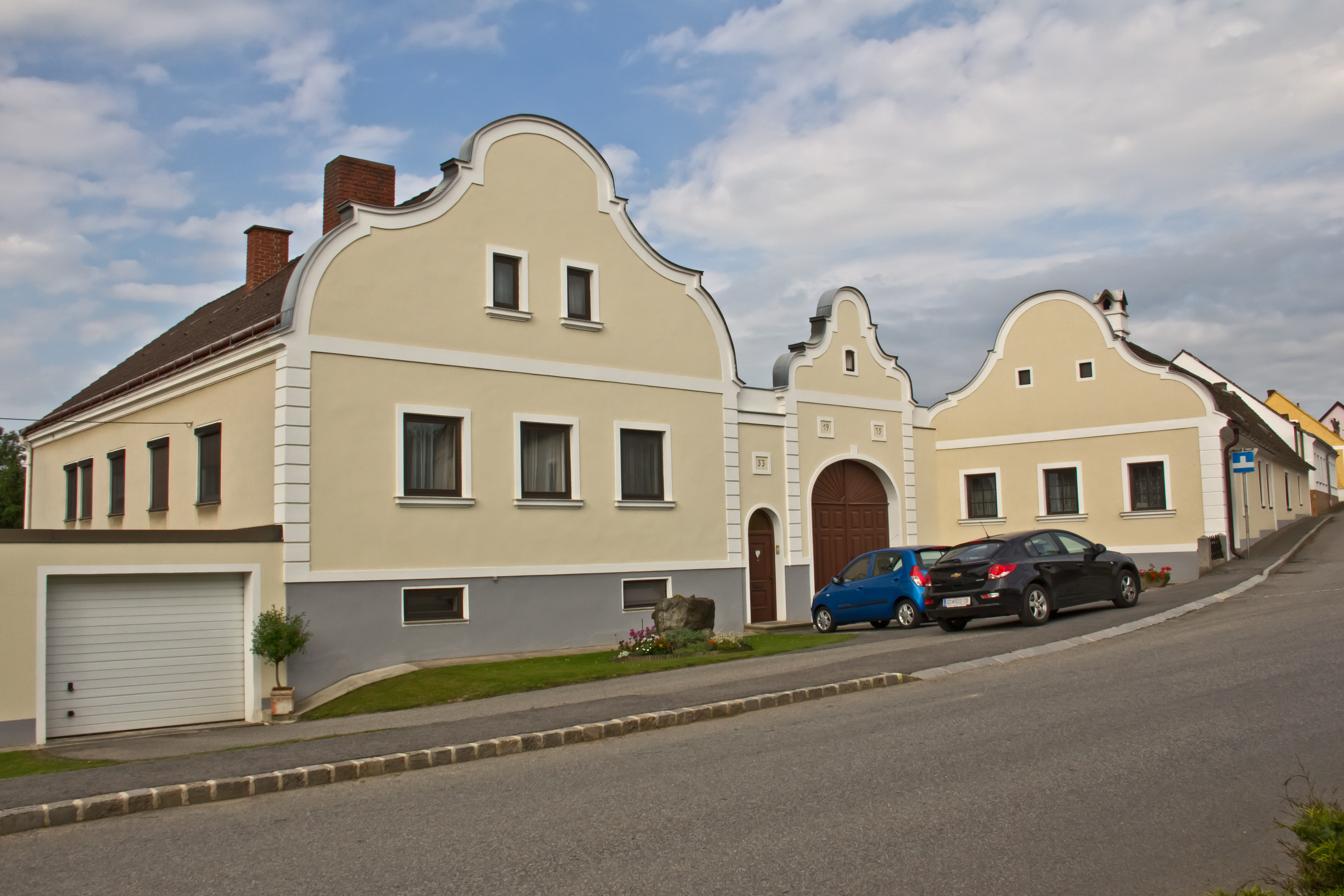 Das Bauernhaus in Obergrünbach 53 hat eine barockisierend geschwungene Rundgiebelfassade.